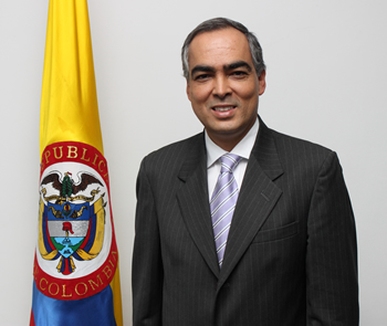 El Ministro de Defansa Nacional Rodrigo Rivera.